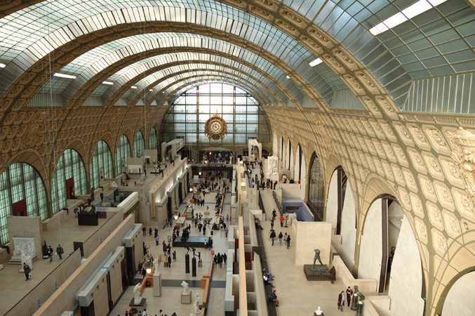 Hall du Musée d'Orsay